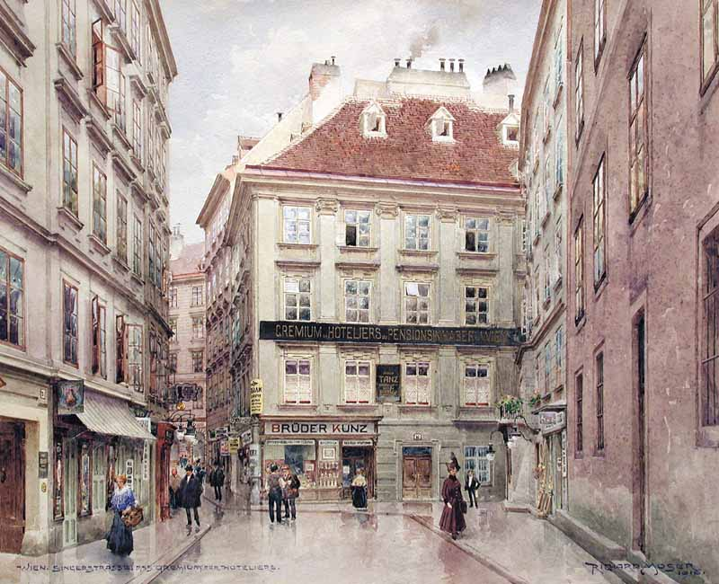 In der Singerstraße